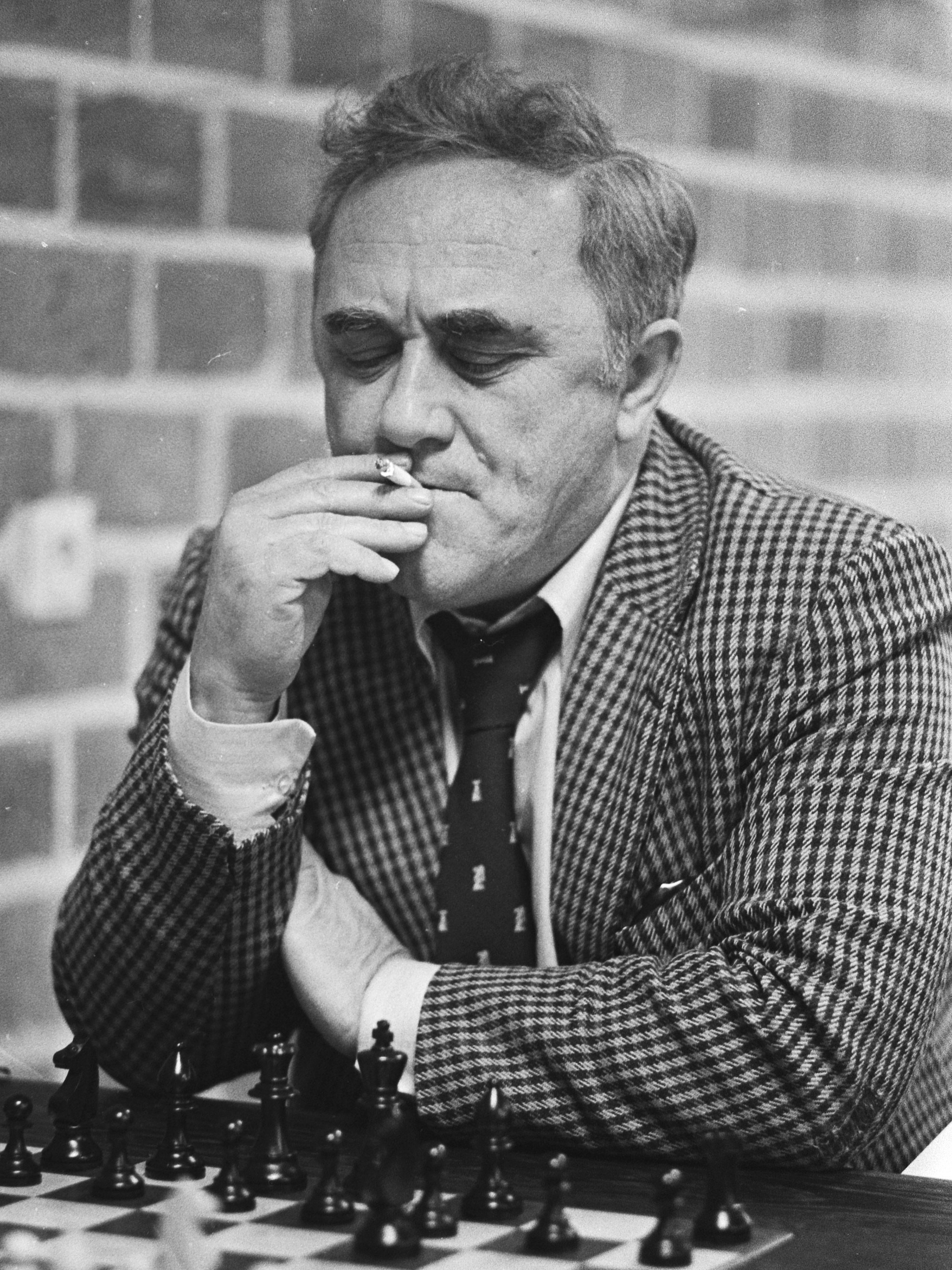 Efim Geller, Hoogovens tournament 1977 (4th round)